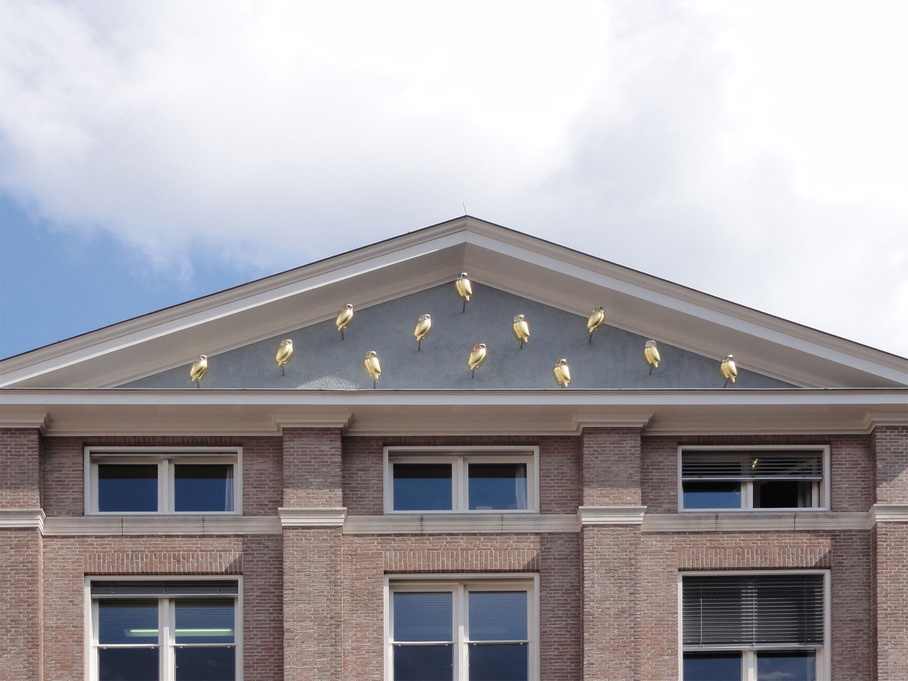 Twaalf gouden uilen door Wia van Dijk - Oude Kijk in 't Jatstraat 26 (timpaan De Harmonie)